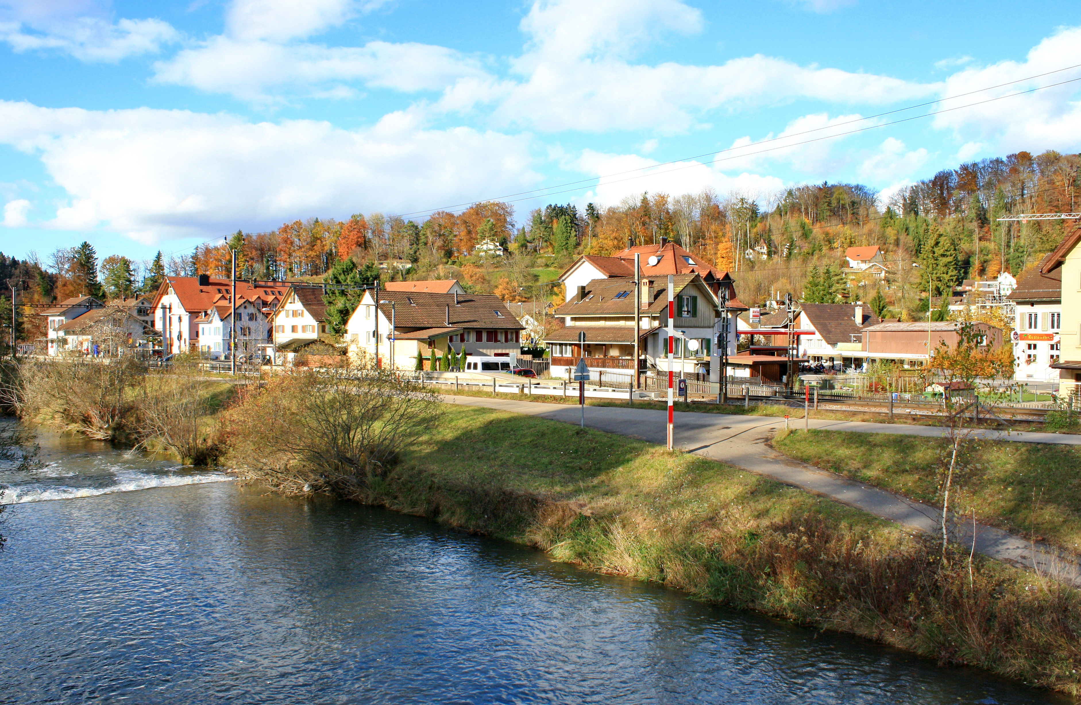 Töss river in Rikon in the Töss Valley (Tösstal) in Switzerland